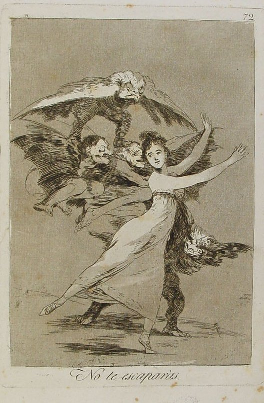 Capricho nº 72: No te escaparás de Goya, serie Los Caprichos